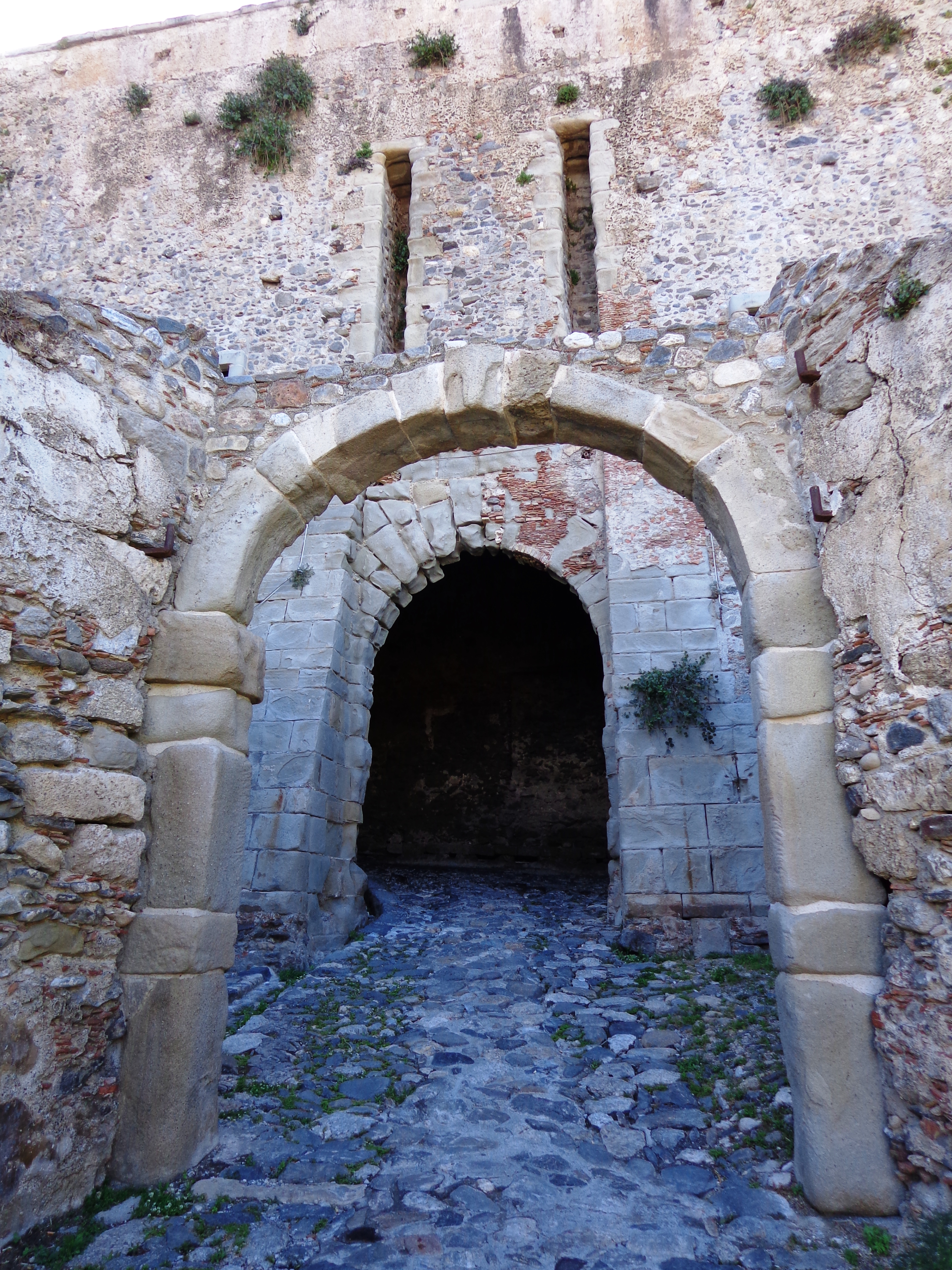 Ingresso